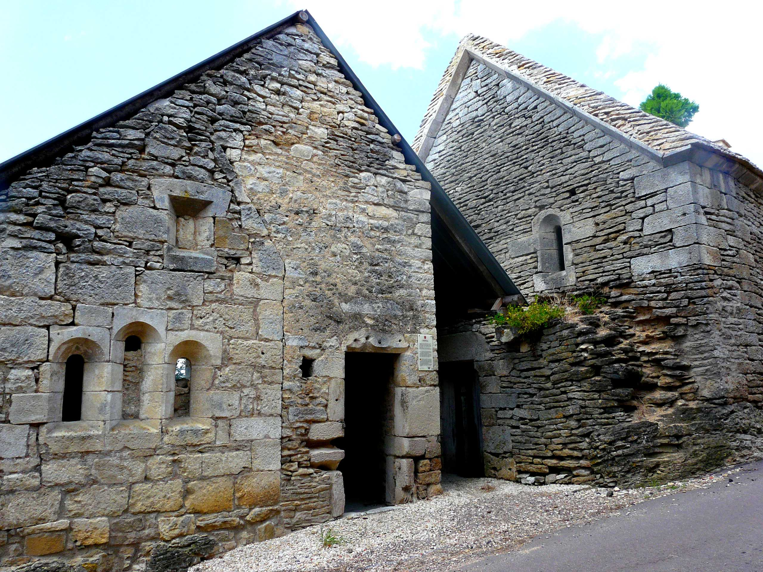 Mont-Saint-Jean, Côte-d'Or, Bourgogne, France. Hôpital de Mont-Saint-Jean dans la rue des Bergeries (classé MH).